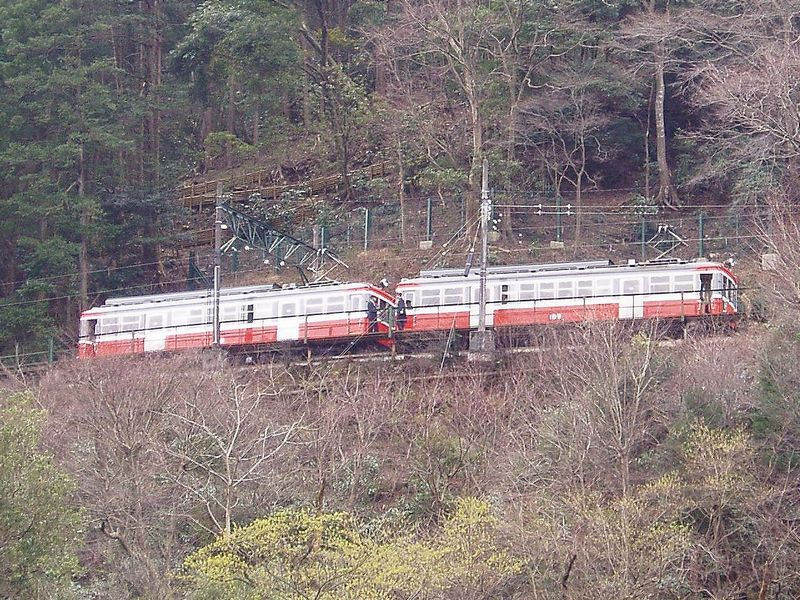 箱根登山鉄道 出山信号場 出山鉄橋から 2007.03.08 投稿者が撮影